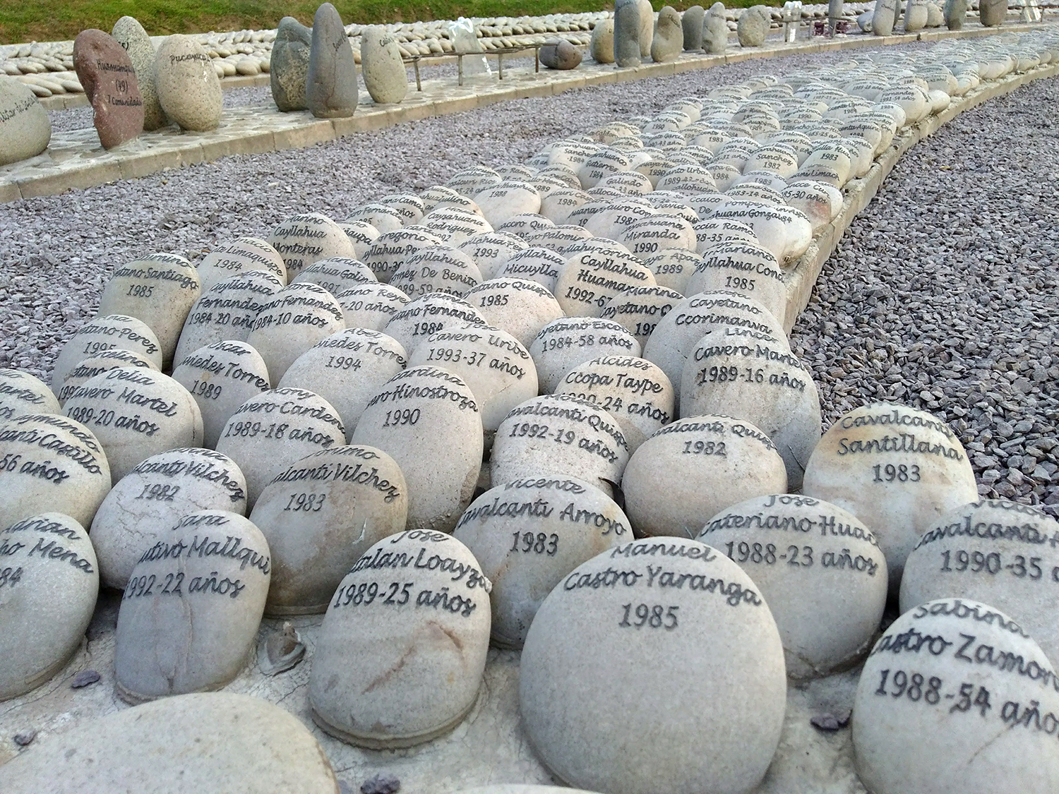 Memorial El ojo que llora, obra de la escultora holandesa radicada en el Perú Lika Mutal, realizado en homenaje a las victimas del conflicto armado interno en el Perú. Este monumento fue declarado patrimonio cultural de la nación por el Ministerio de Cultura del Perú en el año 2013.